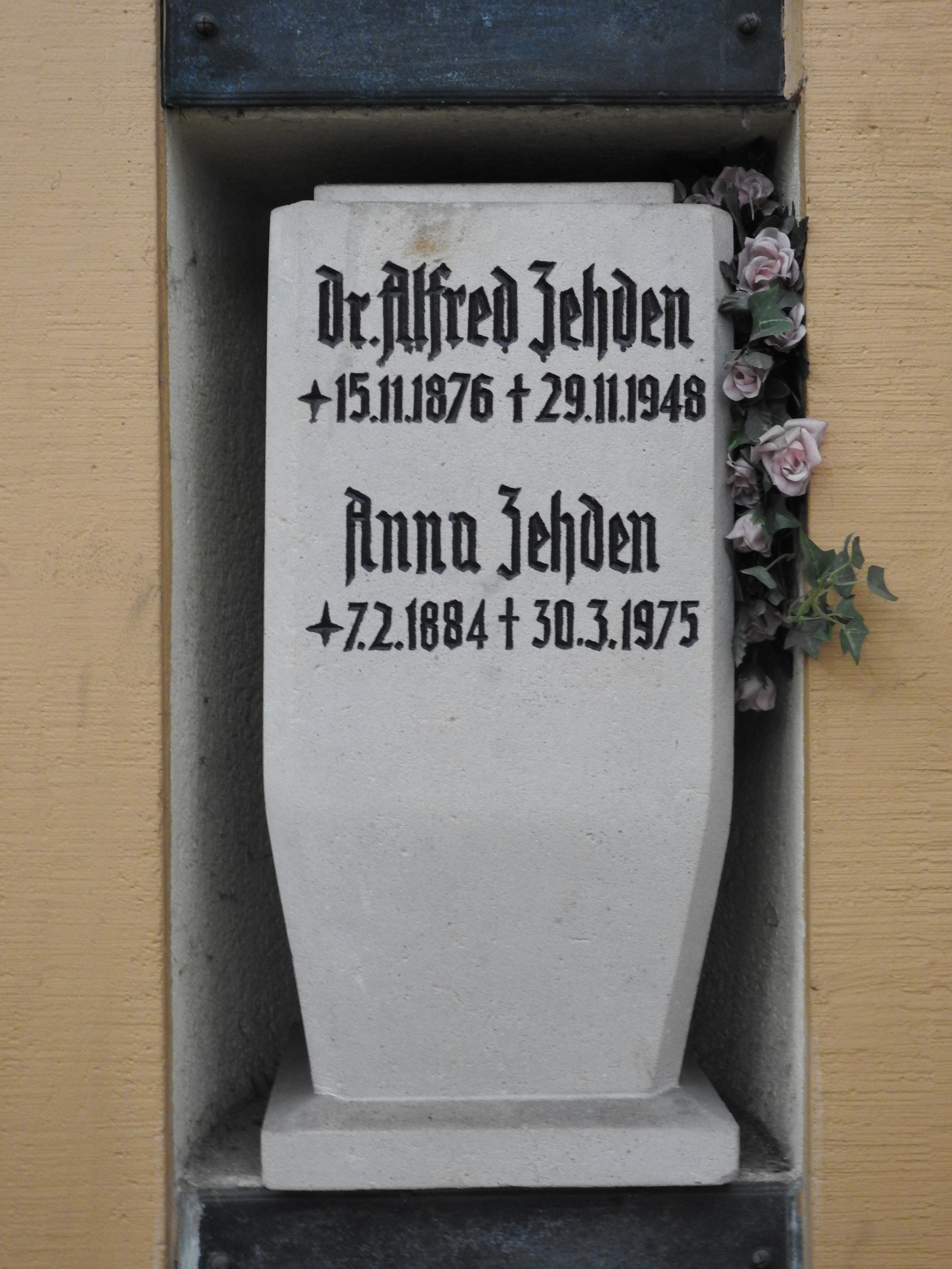 Schmuckurne für Dr. Alfred Zehden (15.11.1876–29.11.1948) und Anna Zehden (7.2.1884–30.3.1975) im Kolumbarium des Friedhofs Wilmersdorf in Berlin